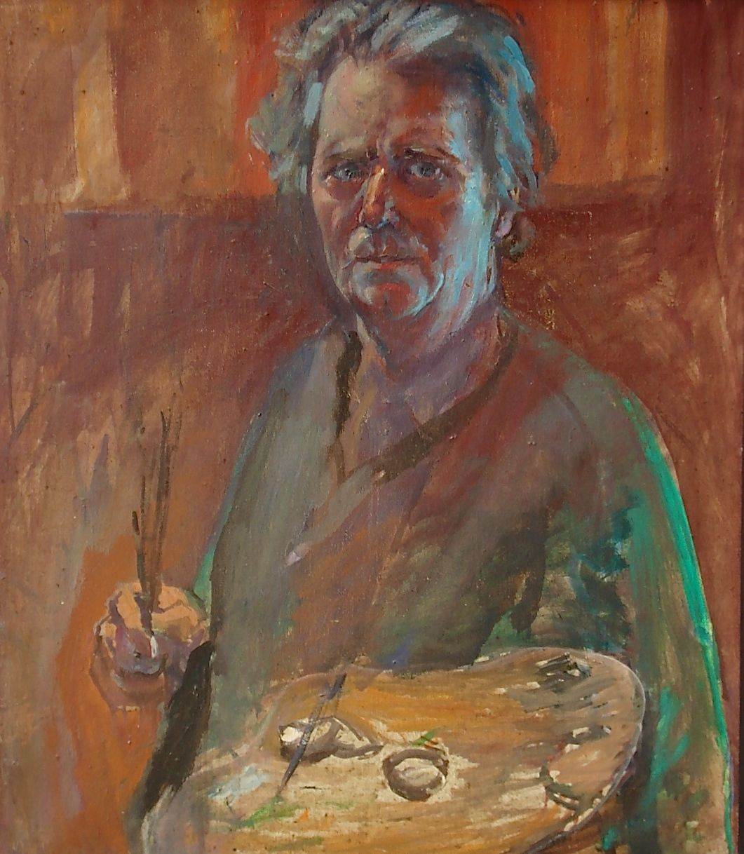 Ostatni autoportret artysty